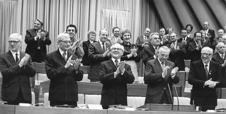 ADN-ZB-Mittelstädt-11.4.81-B-Berlin: X. Parteitag- Im Palast der Republik in Berlin ist der X. Parteitag der SED feierlich eröffnet worden Erich Honecker, Generalsekretär des ZK der Partei, erstattete den Bericht des Zentralkomitees. Hier ein Blick ins Präsidium während des Beifalls der Delegierten - v.l.n.r.: Willi Stoph, Michail Suslow, Erich Honecker, Horst Dohlus und Horst Sindermann.